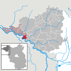 Cumlosen in Brandenburg (Country) - District Prignitz